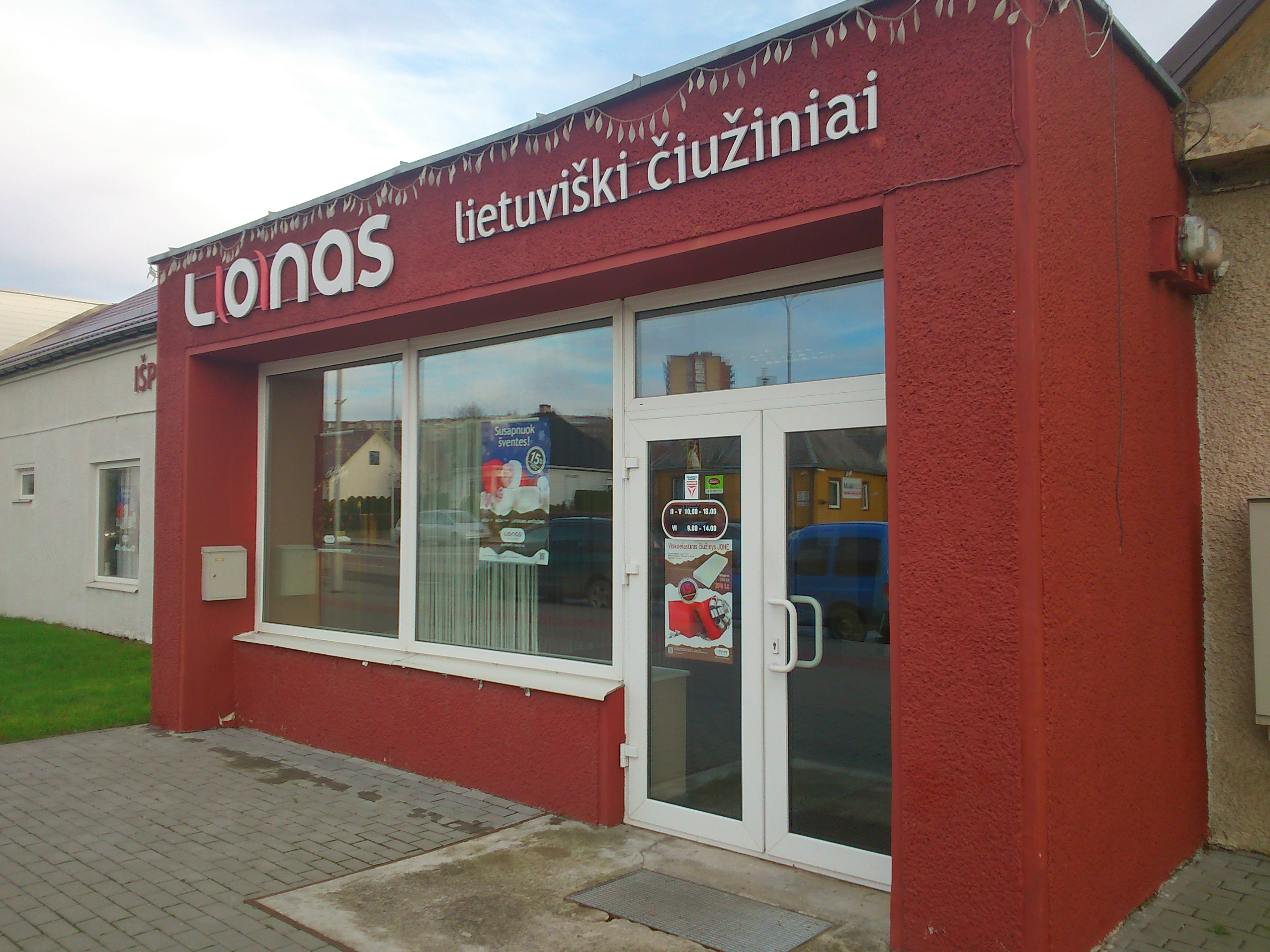 Lonas